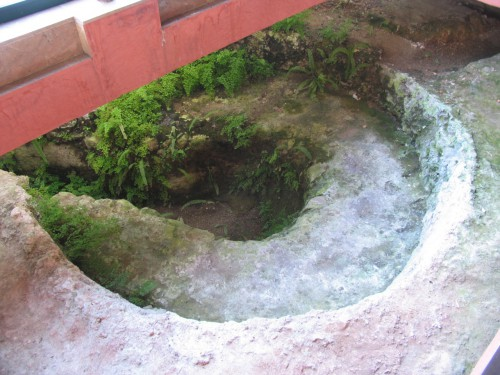 resta de les termes de la Vil·la de la Burguera